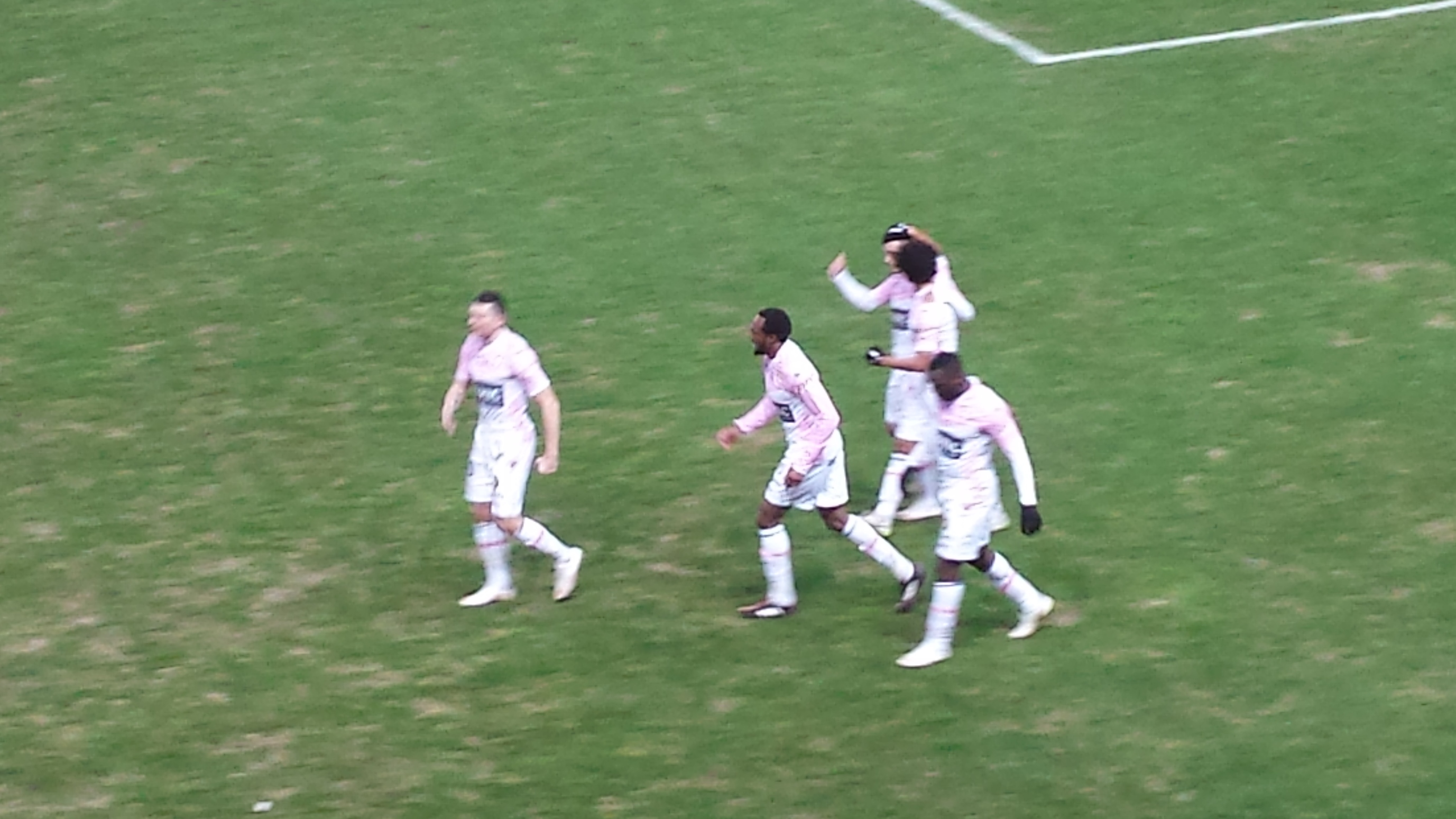 Scènes de joie après le premier but, inscrit par Mathieu Duhamel, lors de la rencontre Lens - Evian TG, au Stade de la Licorne, match comptant pour la vingt-cinquième journée du championnat de France de football de Ligue 1 2014-2015, le 14 février 2015.